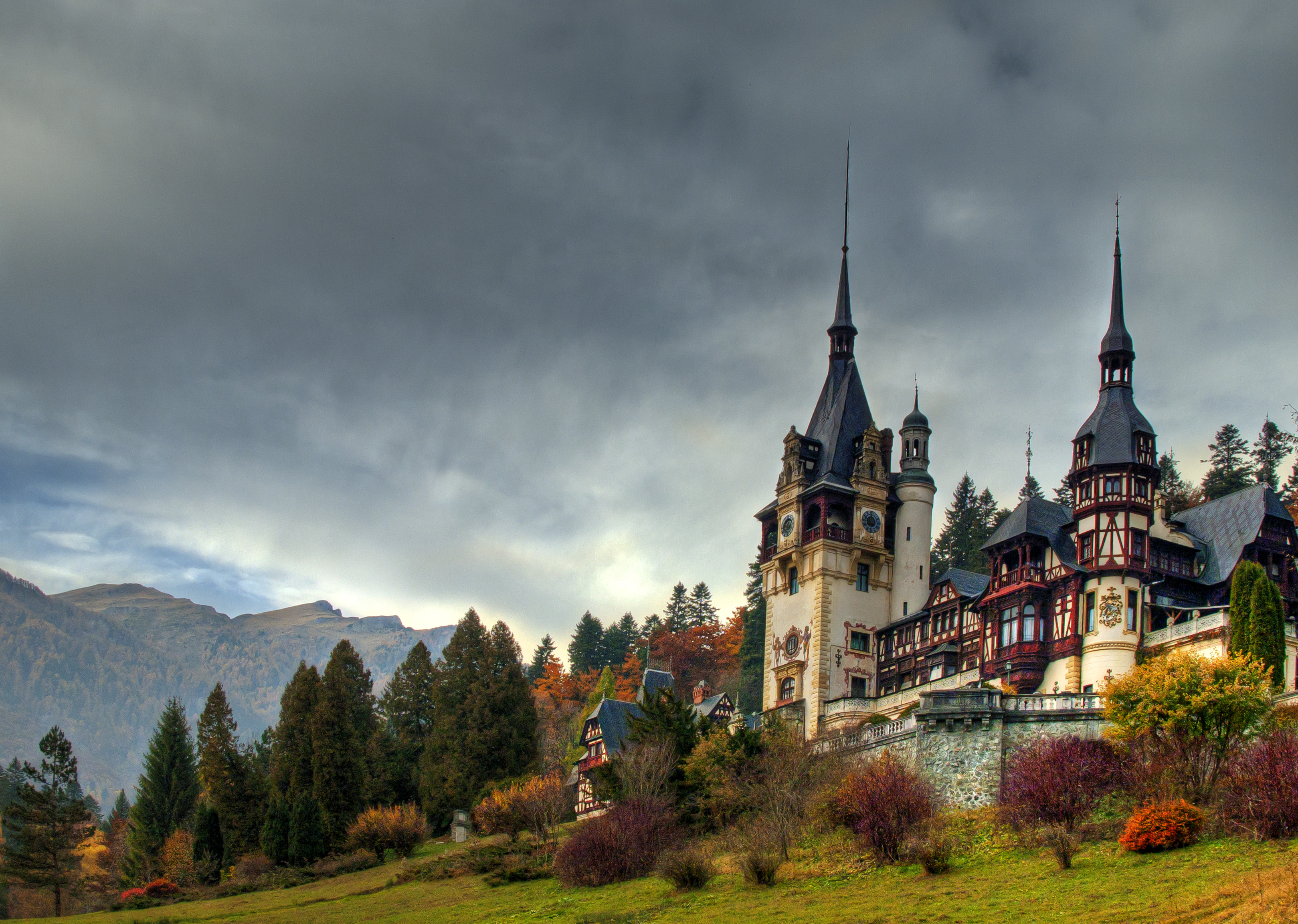 Peisaj de toamna la Castelul Peles, Sinaia, cu Muntii Bucegi in fundal. Беларуская (тарашкевіца): Замак Пэлеш ля Сынаі ў Румыніі на фоне гор Бучэджы. 01